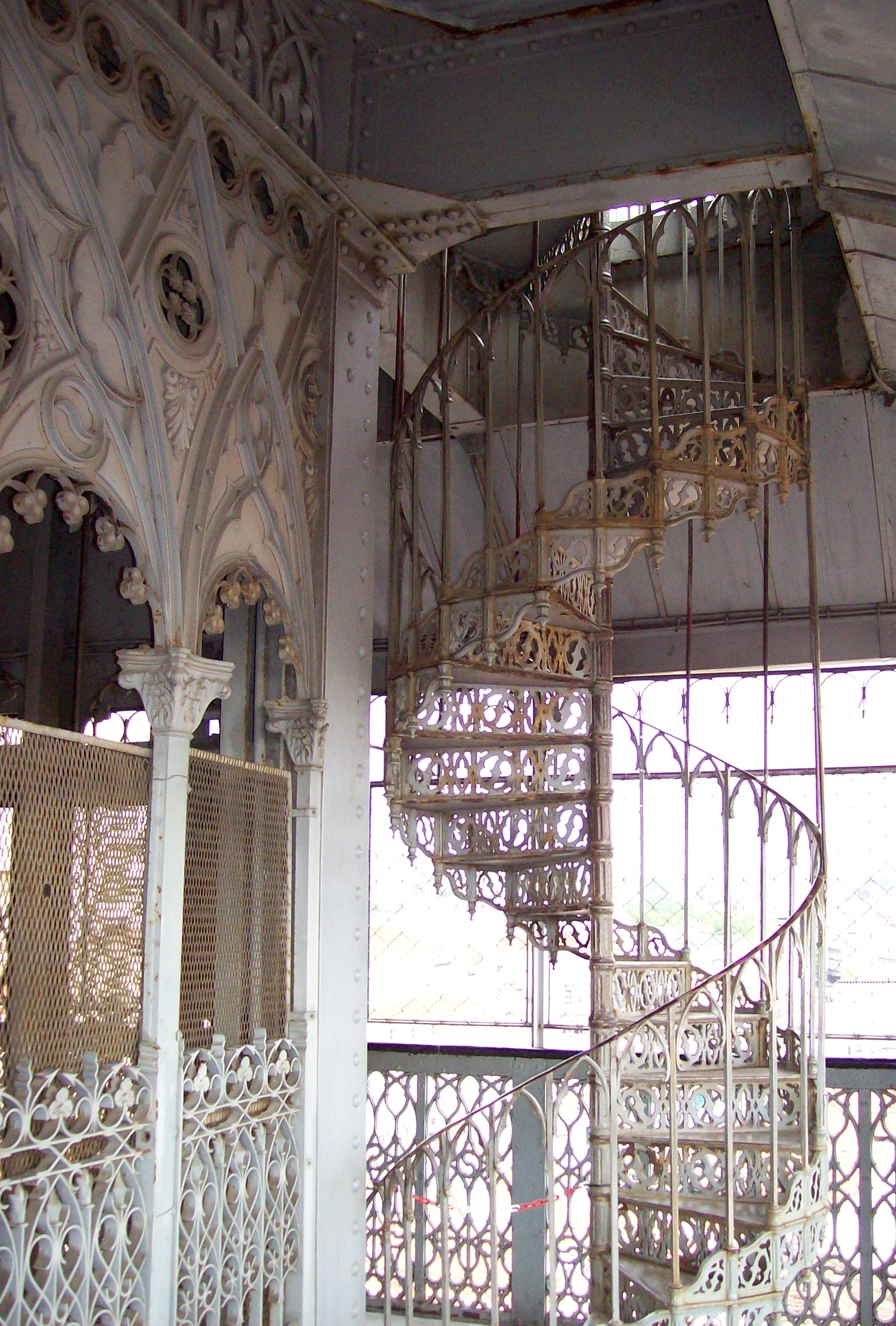 Elevador de Santa Justa in Lissabon (Portugal)